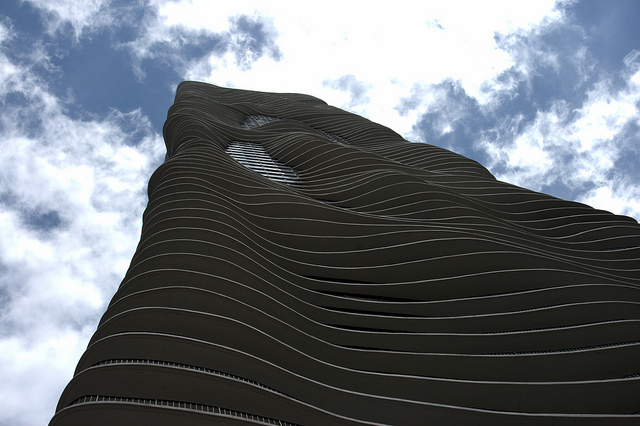 Aqua